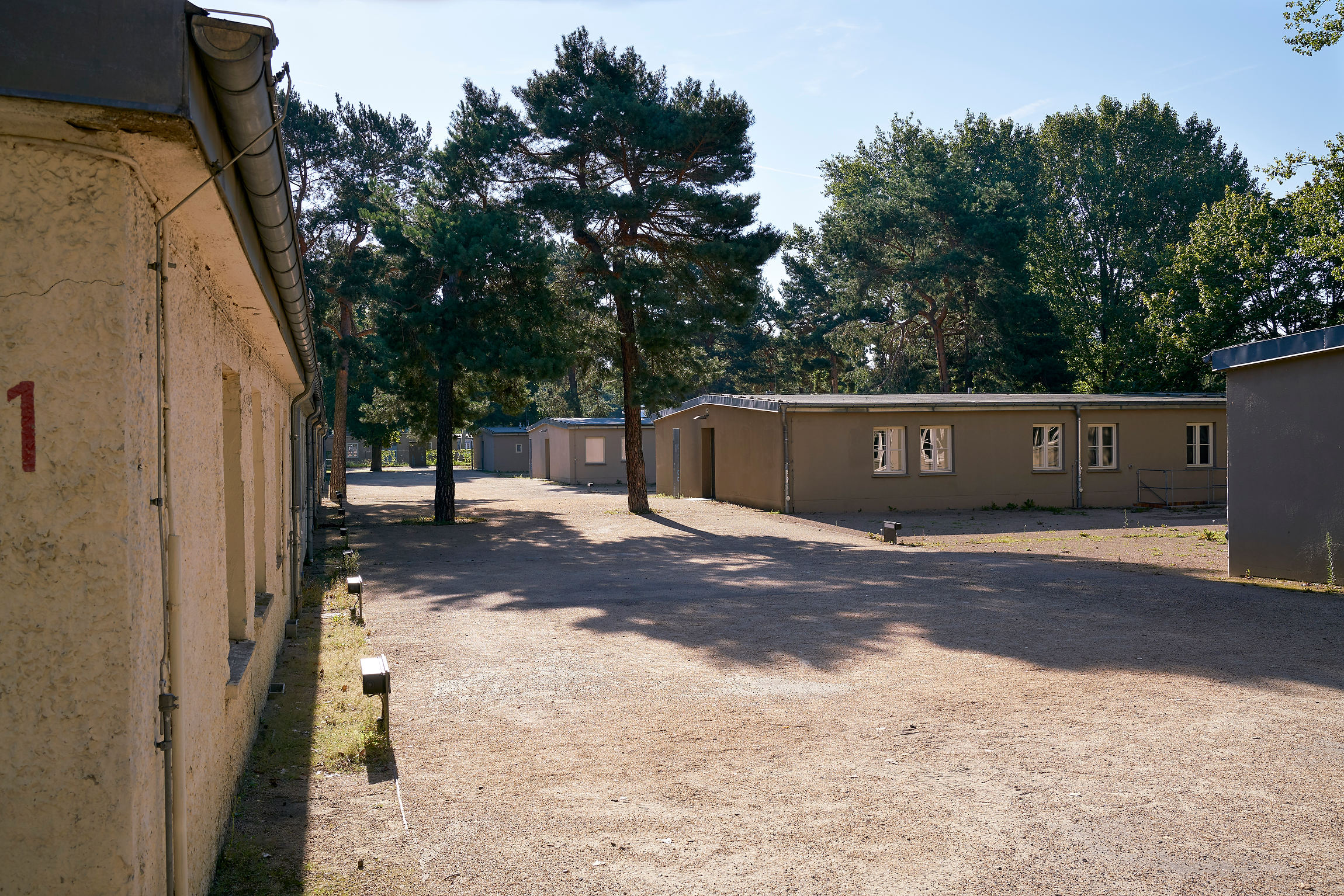 Baracken des ehemaligen Lagers GBI 75/76 im Jahr 2017.